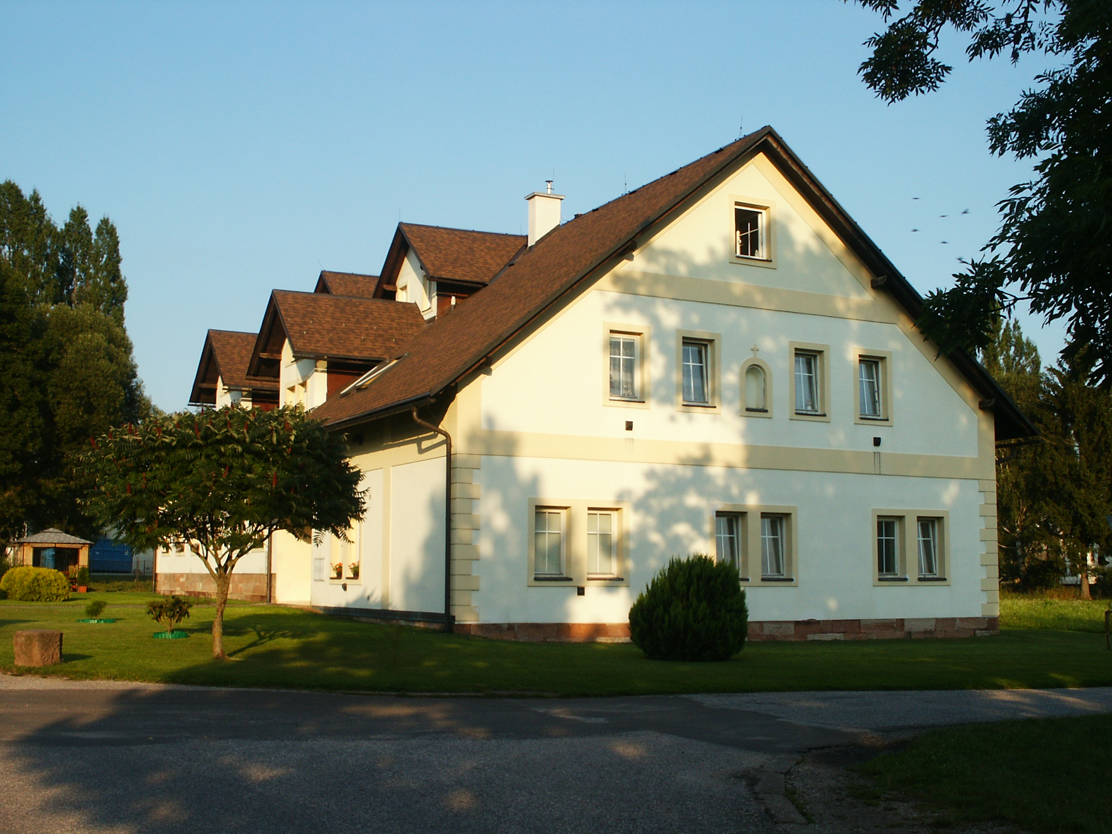 Prostřední Lánov - č.p. 23